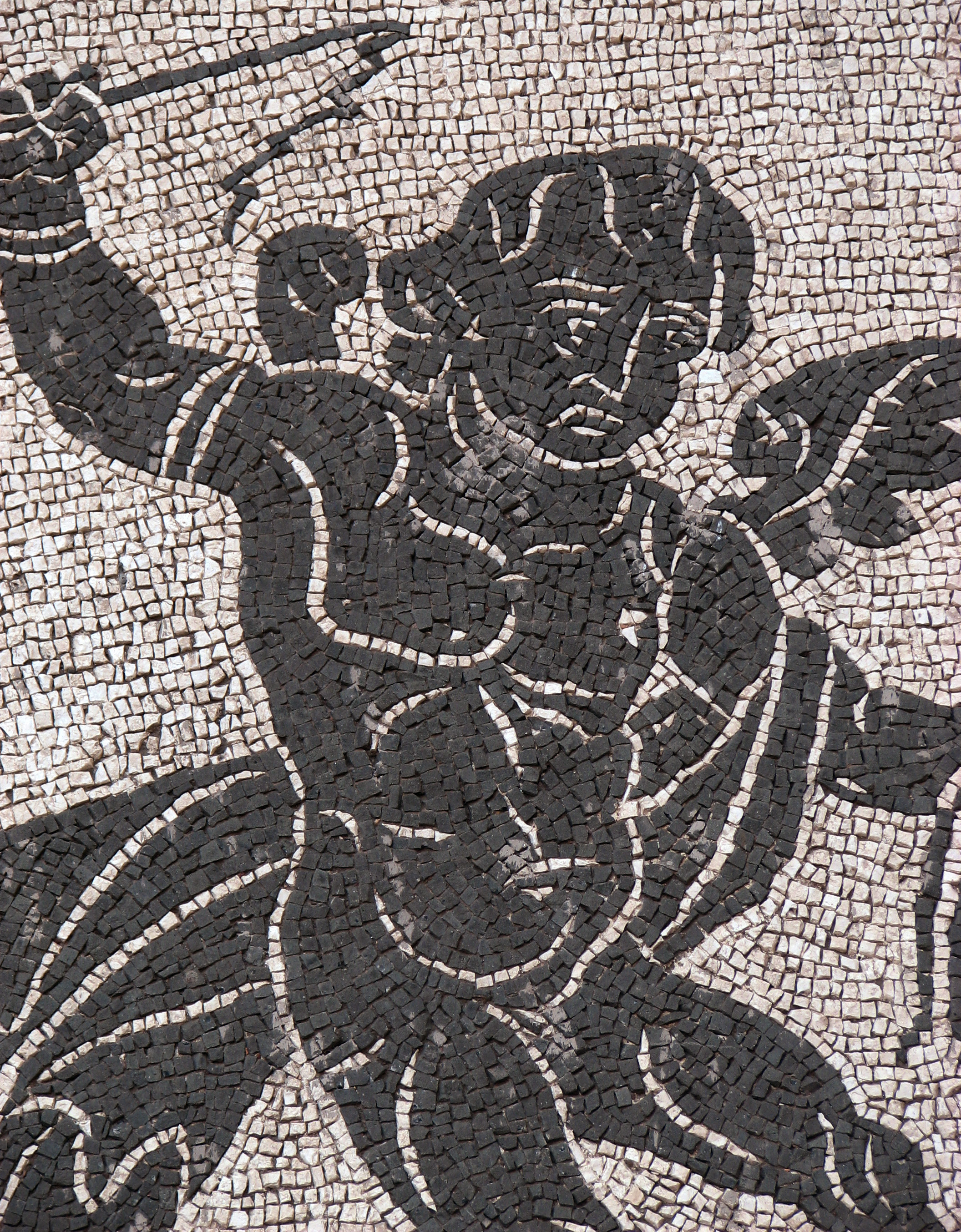 Mosaico monocromo delle Terme di Caracalla - Roma, Italia